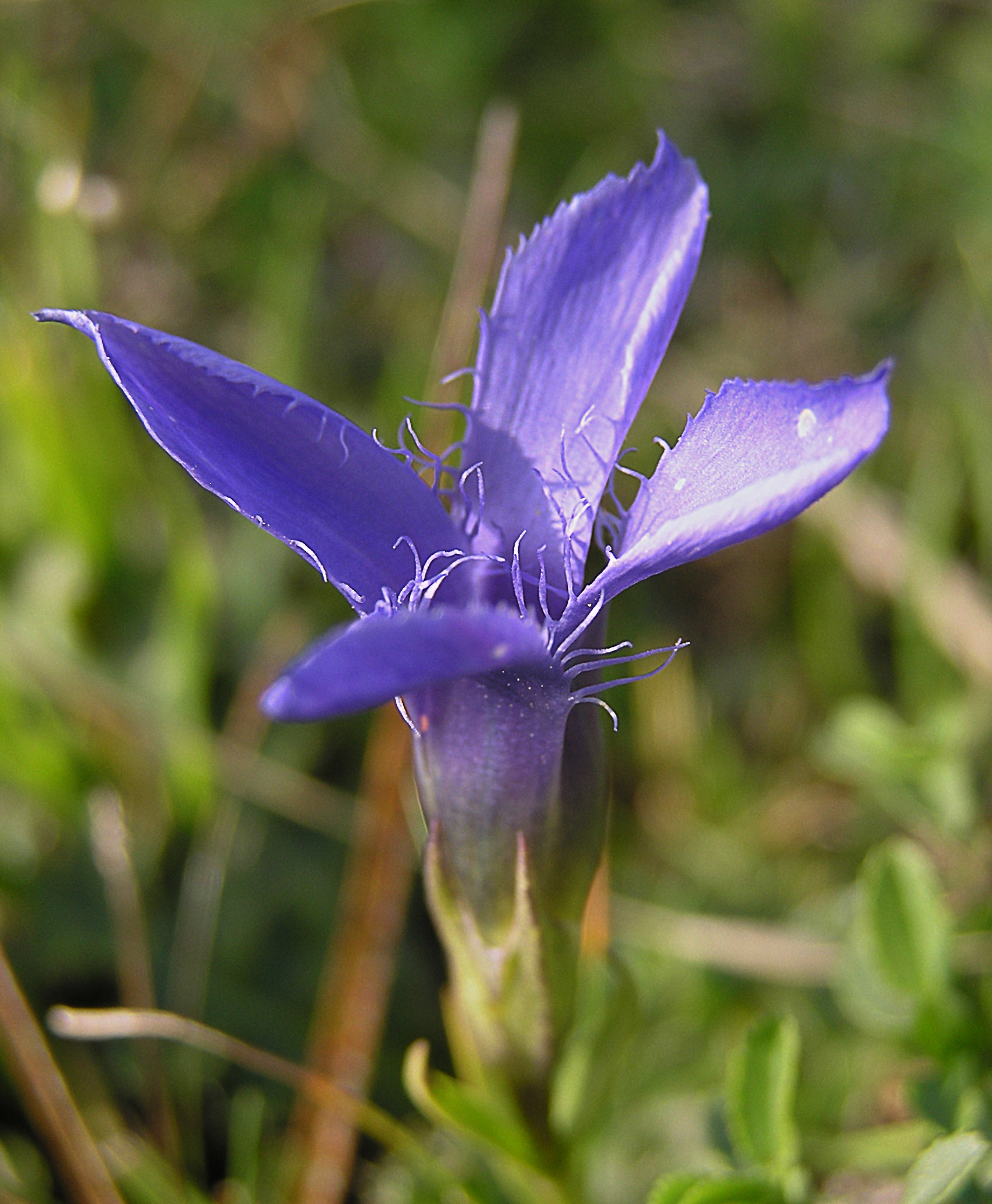 Gentianella ciliata Seitenansicht